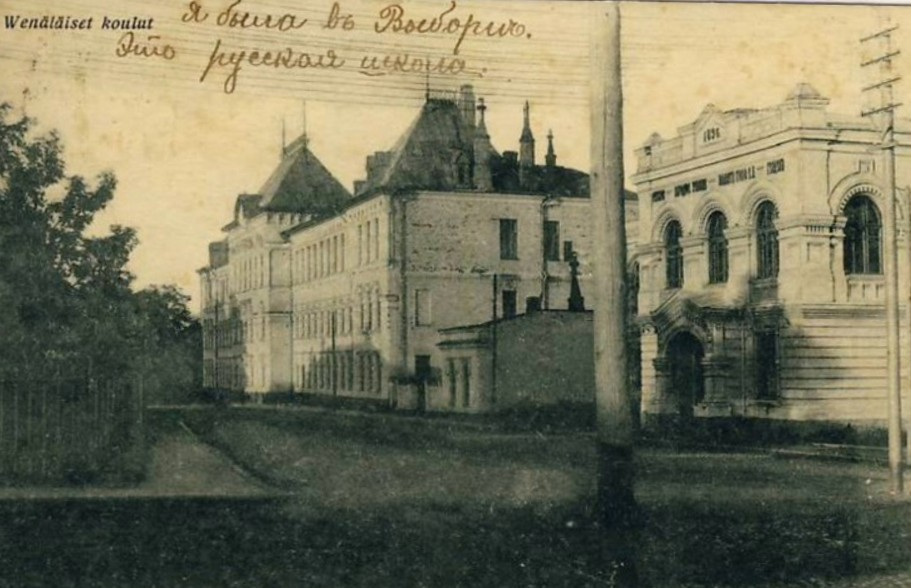 Выборгское реальное училище и выборгское начальное училище